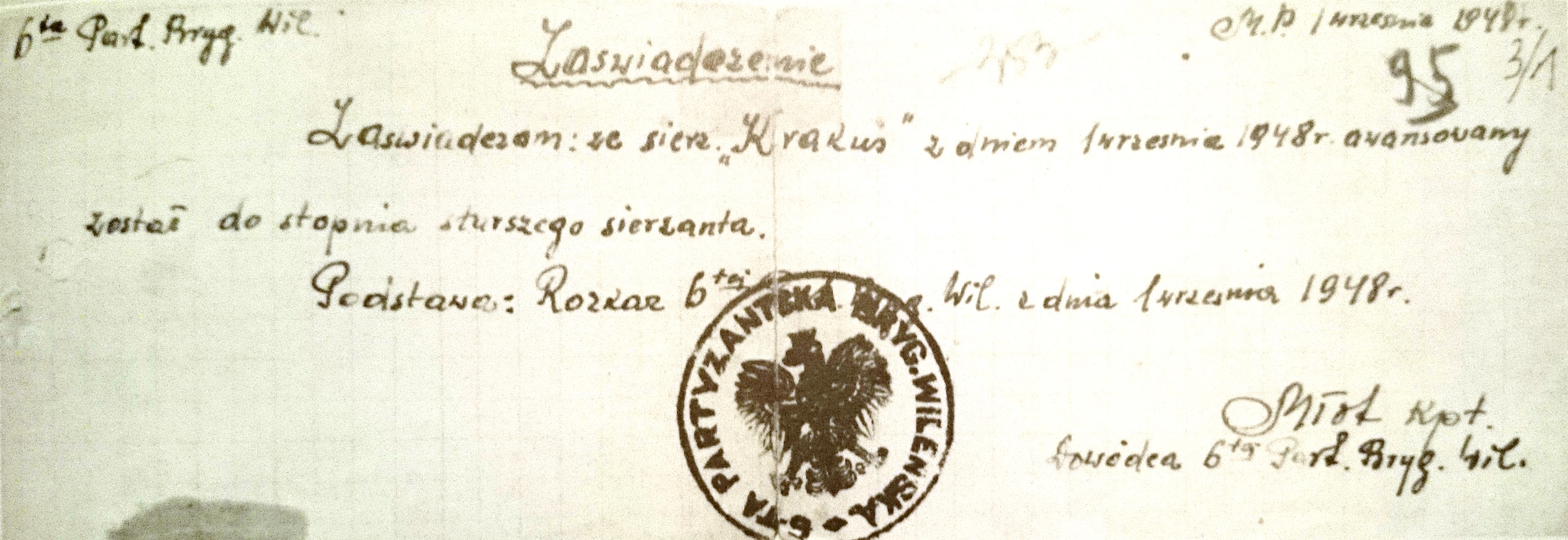 Zaświadczenie o mianowaniu na stopień starszego sierżanta z 1 września 1948 roku wystawione przez Władysława Łukasiuka "Młota" dowódcę 6 Wileńskiej Brygady (WiN)